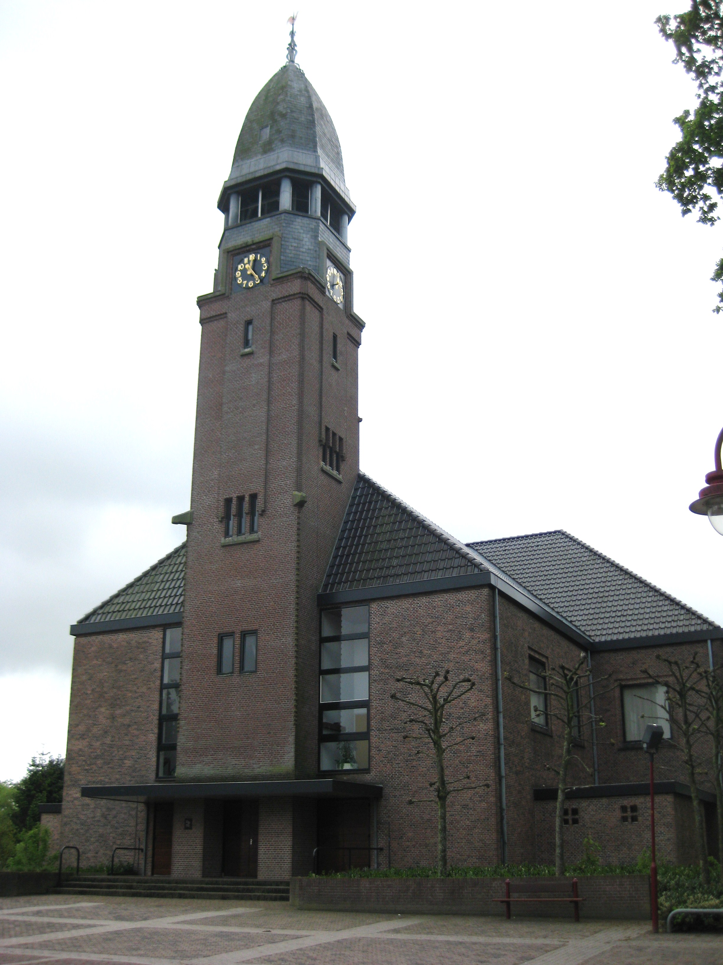 Nederlandfs Hervormde Kerk in Vriezenveen